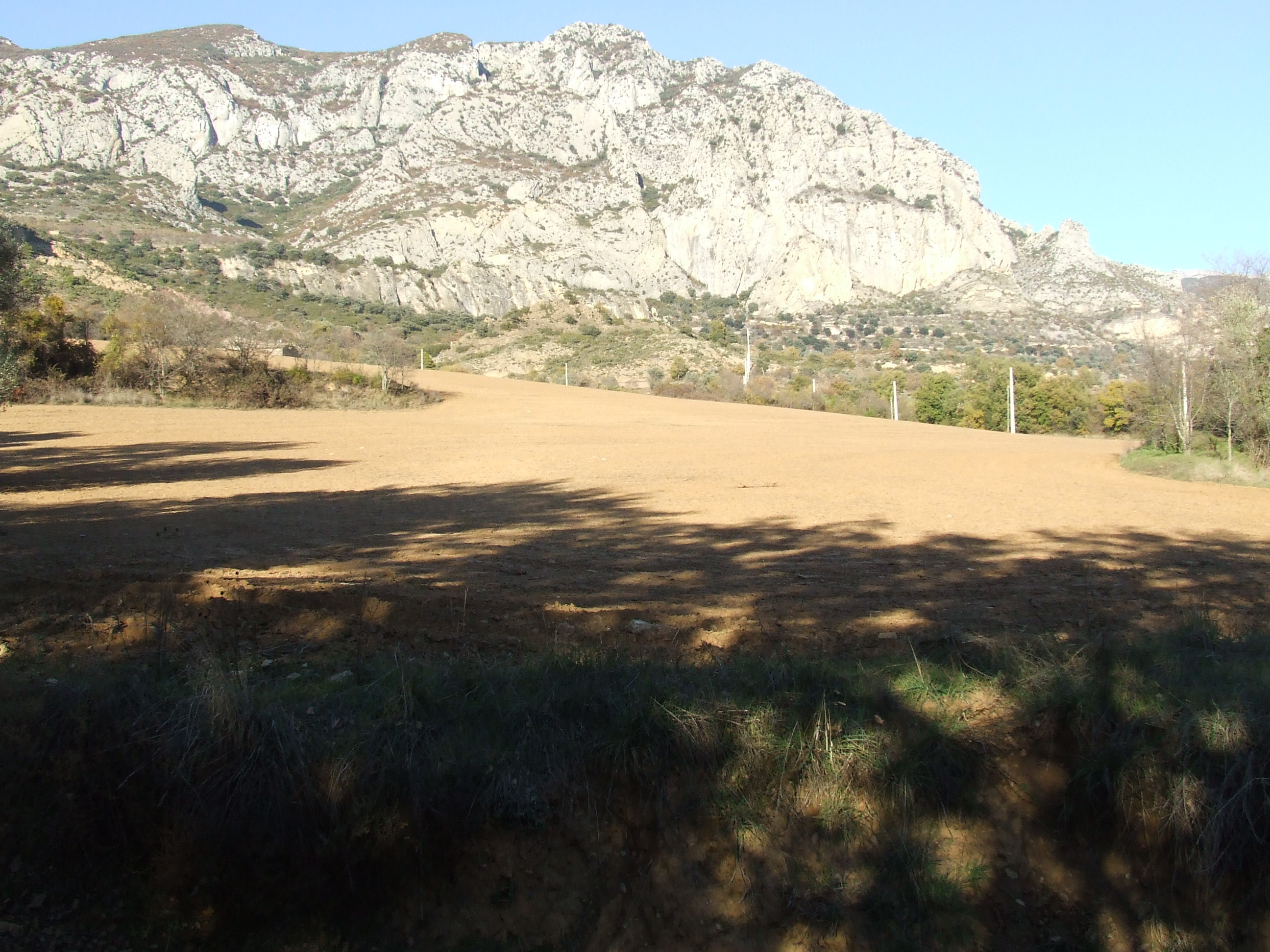 Ço del Jou (Abella de la Conca, Pallars Jussà)